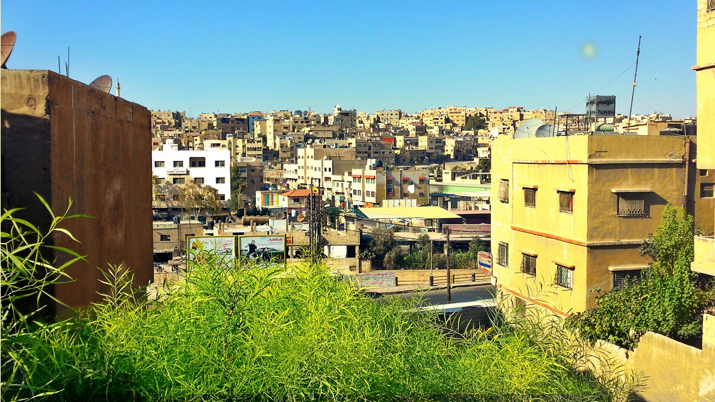 مدينة الرصيفة في الأردن